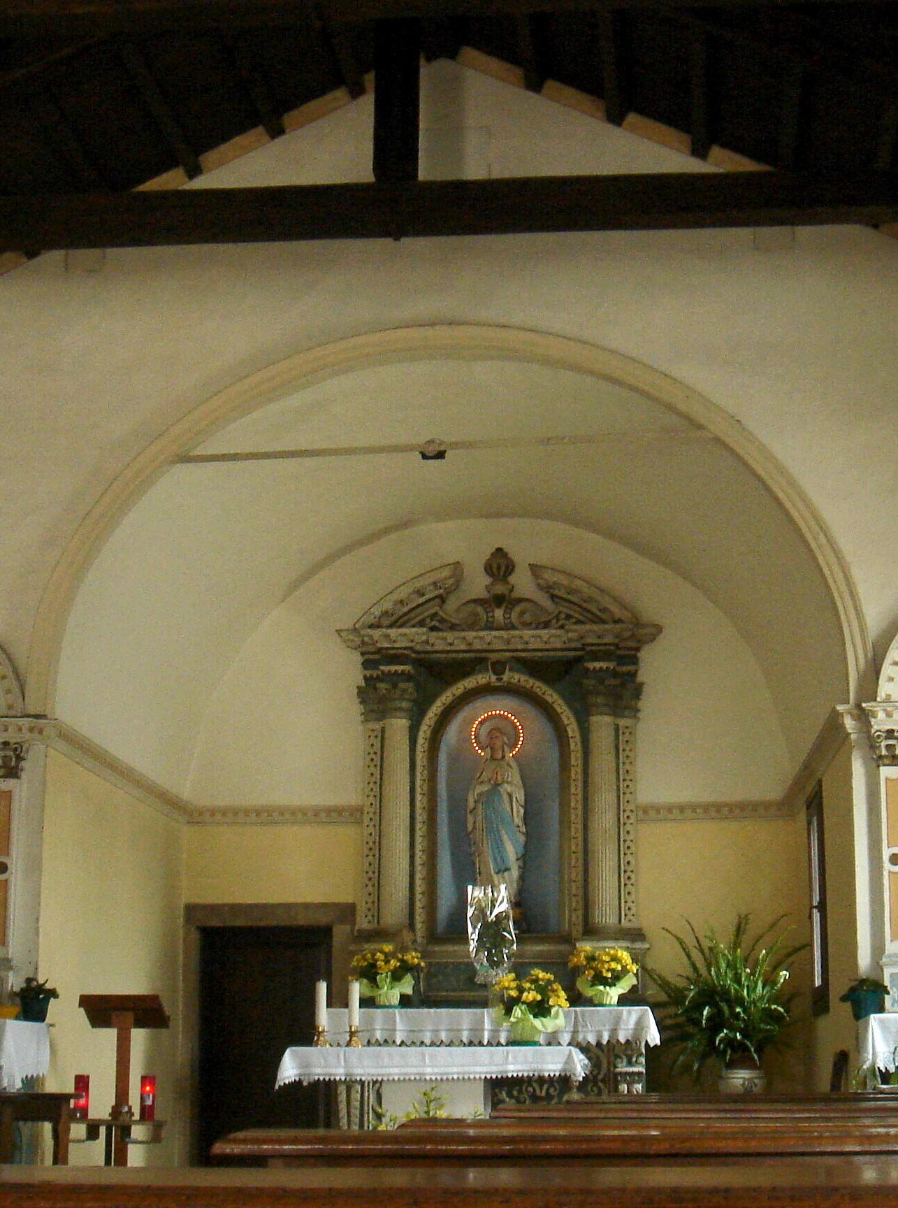 San Fior (Treviso): interno della chiesa di San Bernardino (XV secolo).